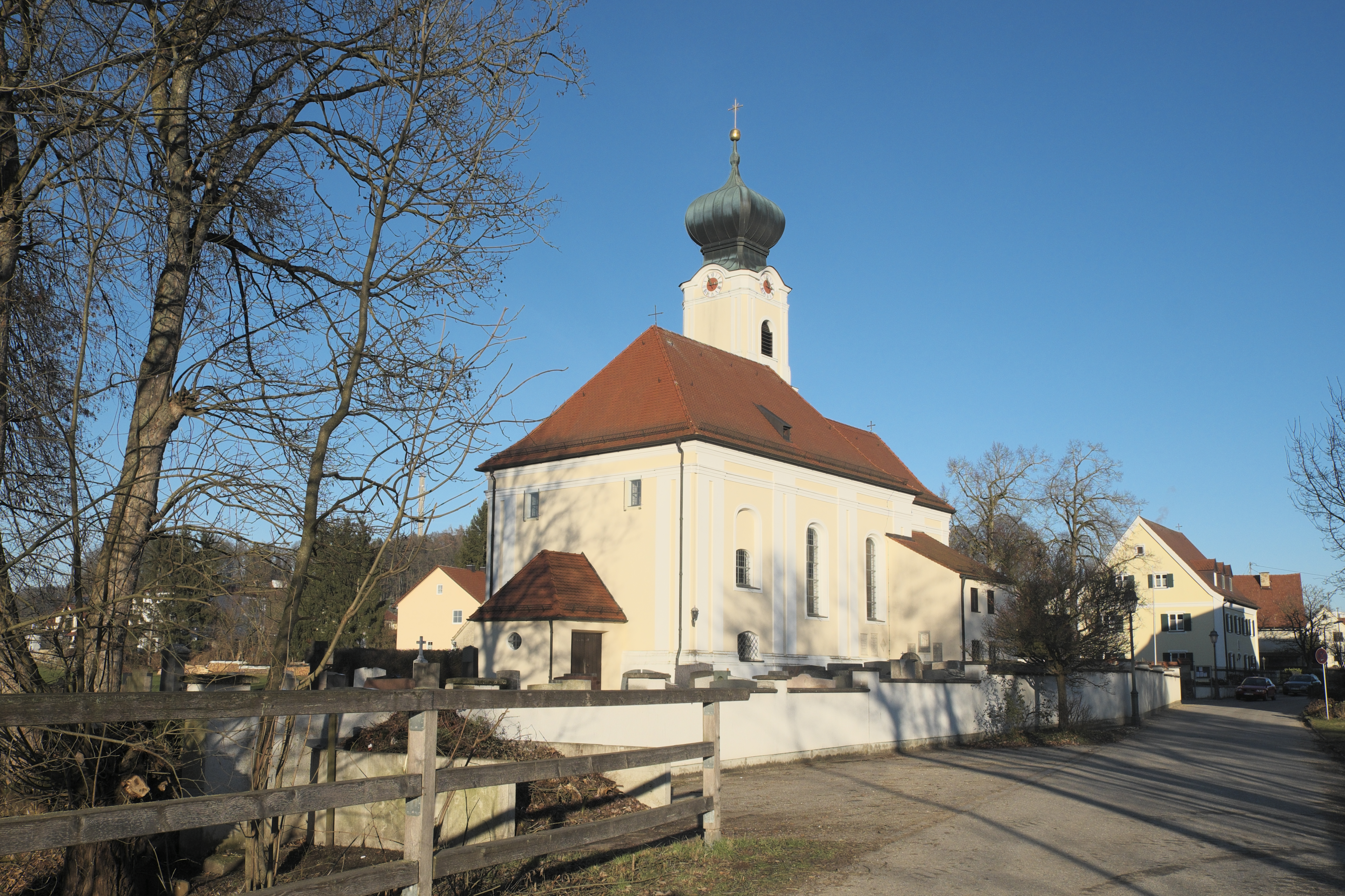 Katholische Pfarrkirche Mariä Himmelfahrt in Klingen (Aichach) im schwäbischen Landkreis Aichach-Friedberg (Bayern/Deutschland)